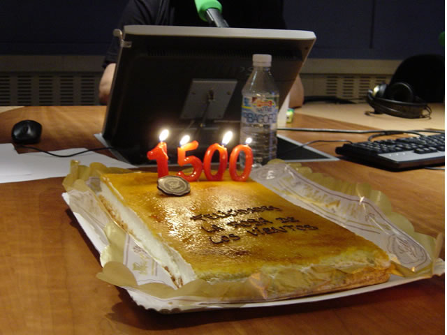 Imagen del programa La Rosa de los Vientos